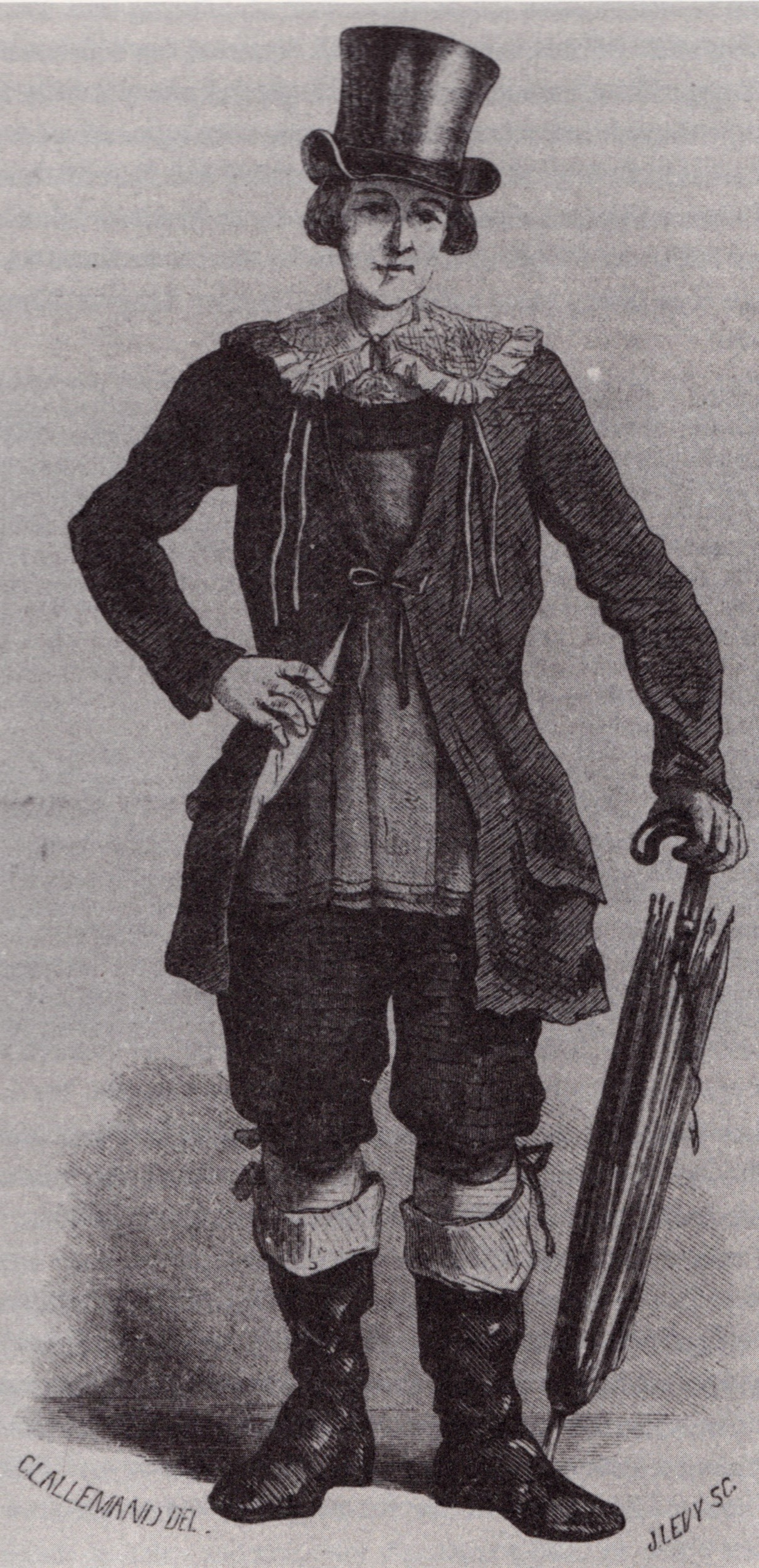 Mann in Hotzenwälder Tracht (Holzstich)